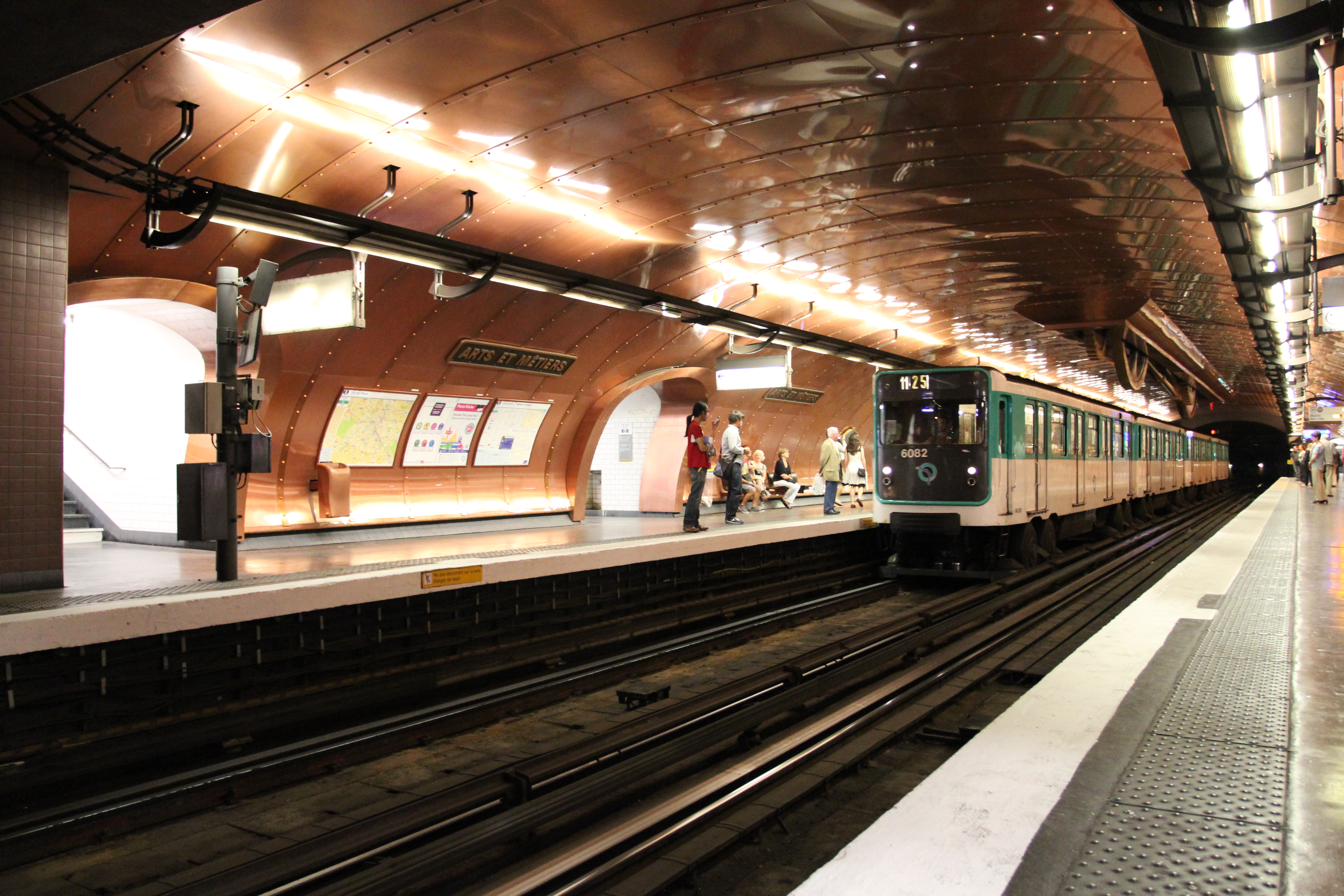 Station Arts & Métiers - Ligne M11 Paris